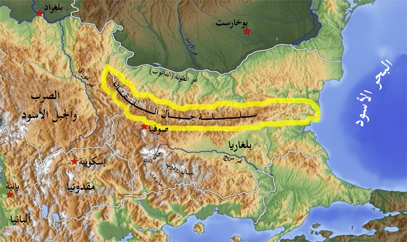 موقع جبال البلقان في بُلغاريا.